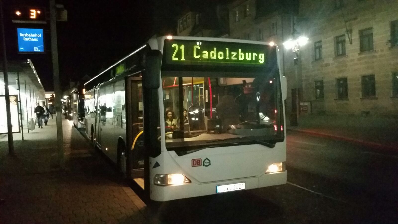 Nachtbus Linie 21 in Fürth